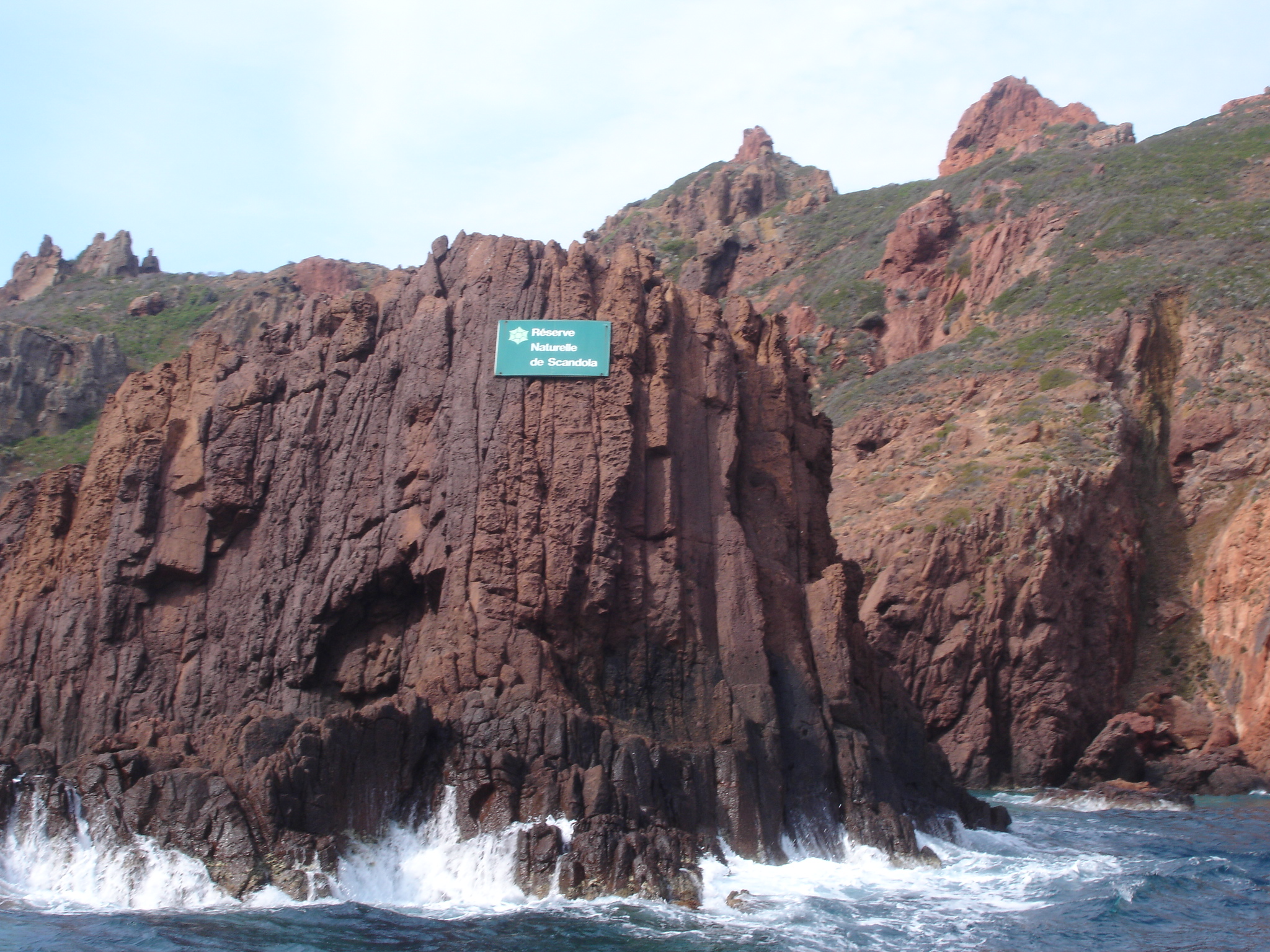 France, Corse-du-Sud (2A), Réserve de Scandola, panneau de la réserve